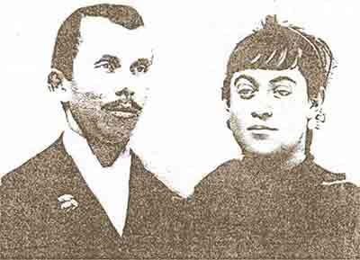 Нико Йовков (1879 - 1903)